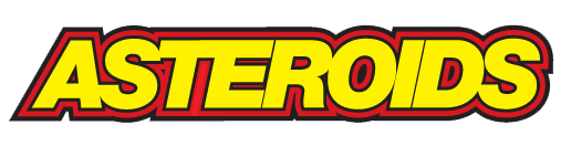 Logo des Videospiels Asteroids (1979)